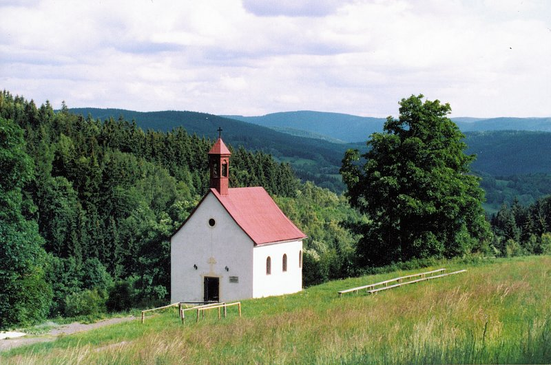 Wrzosówka - rzymskokatolicki kościół filialny pw. św. Karola Boromeusza